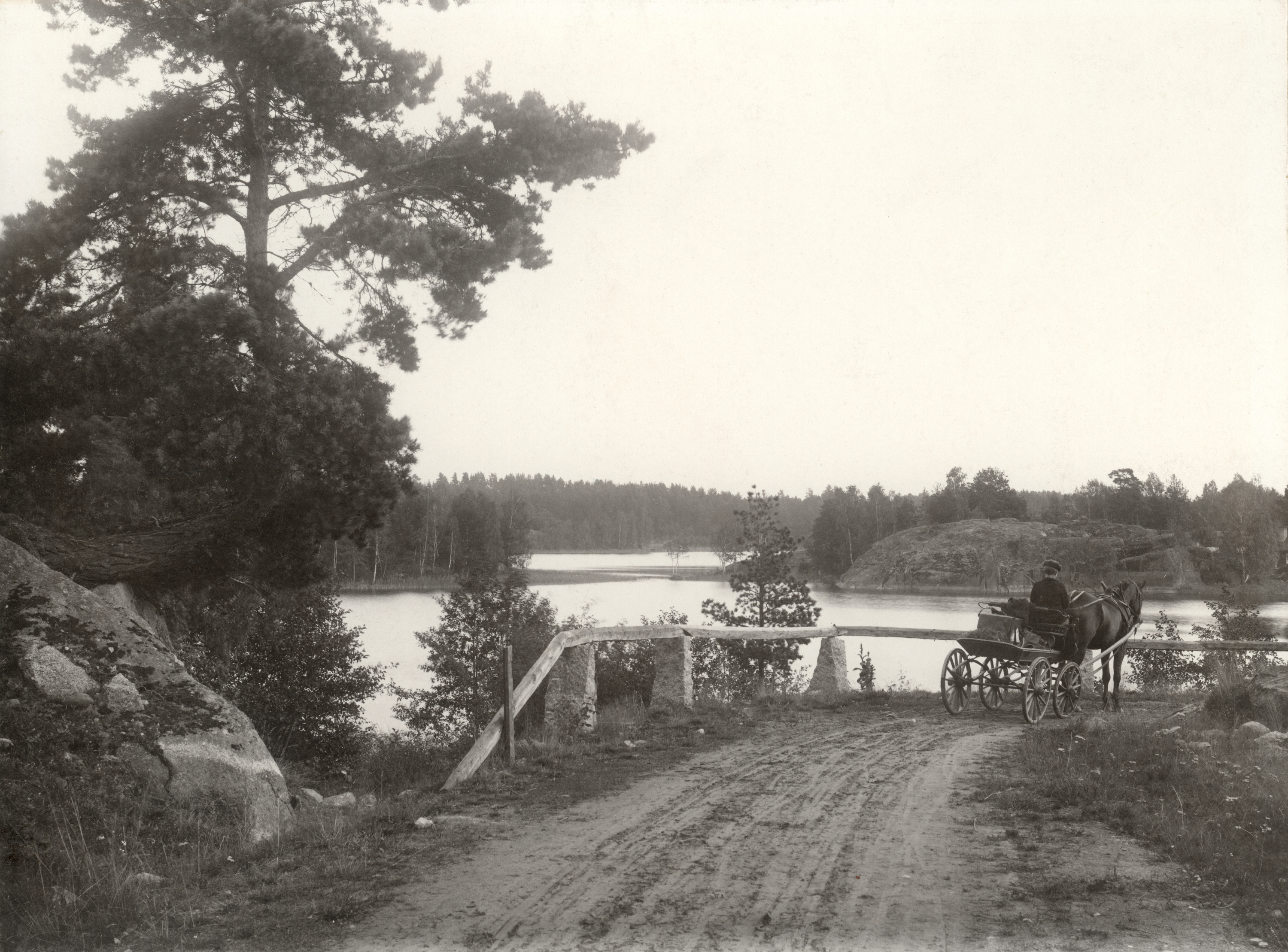 Hjuldon för åktransport. Östergötland. Kinda hd. Vårdnäs sn. Brokind. ”Landsvägsmotiv nära Brokinds station.”